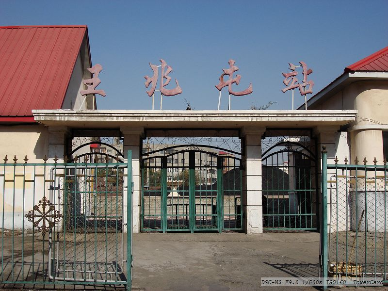 王兆屯站